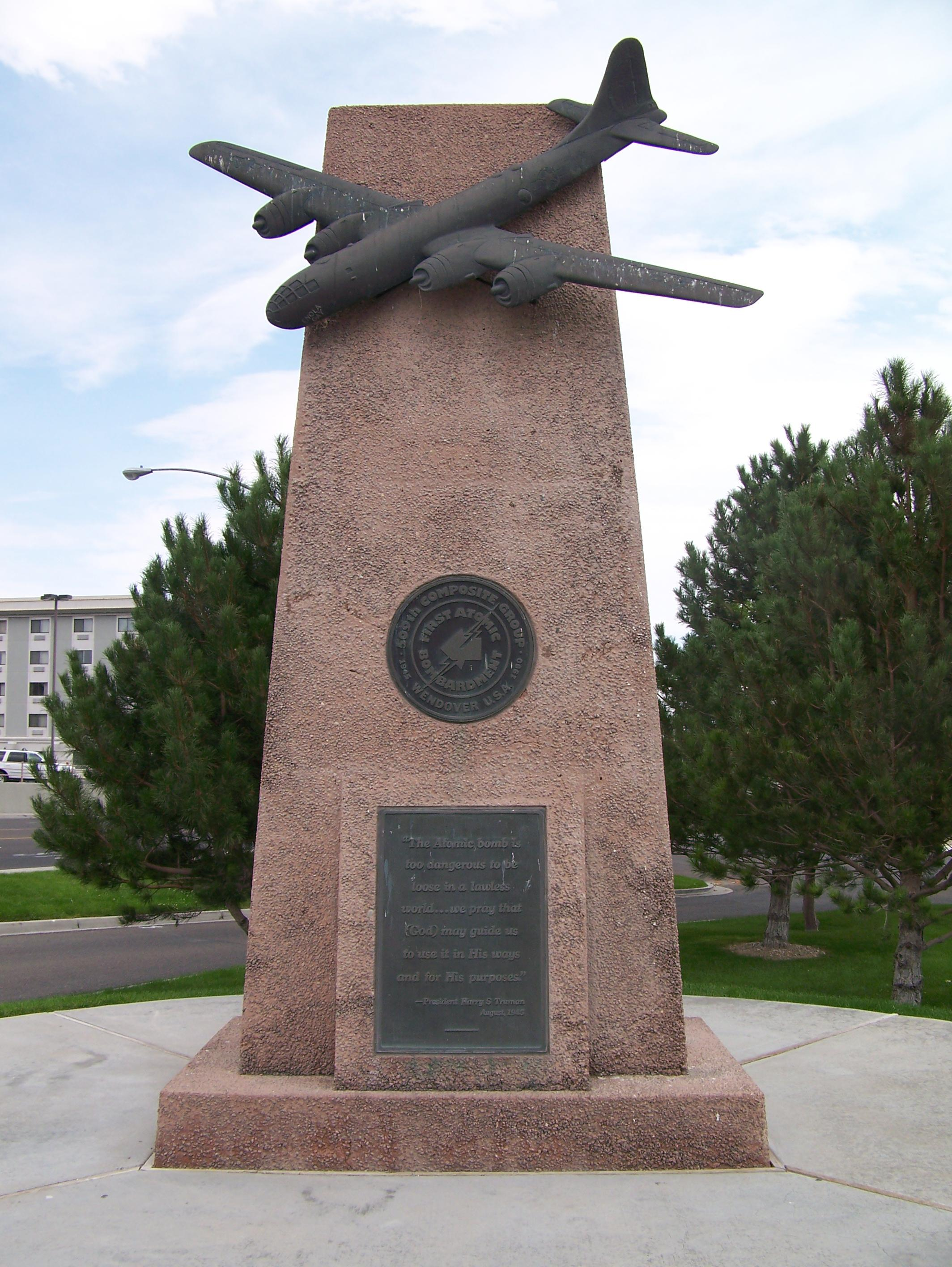 USAAF Monument in West Wendover, Nevada